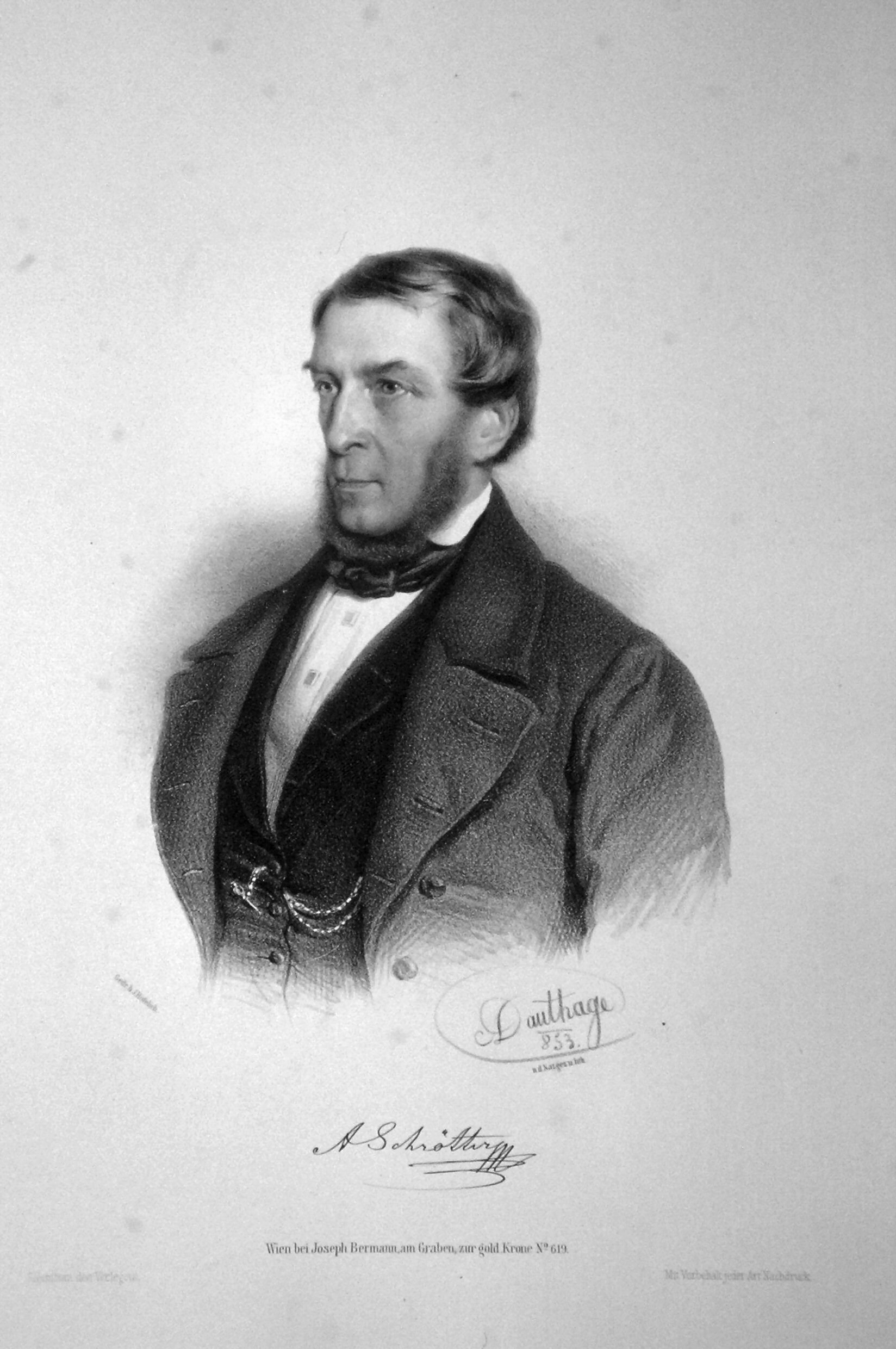 Anton Schrötter von Kristelli, Lithographie von Category:Adolf Dauthage (1883), 1853